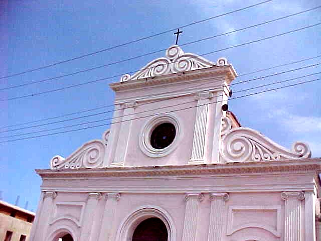 La Guaira en el estado Vargas - Venezuela a un año de del deslave de diciembre de 1999 (2000)